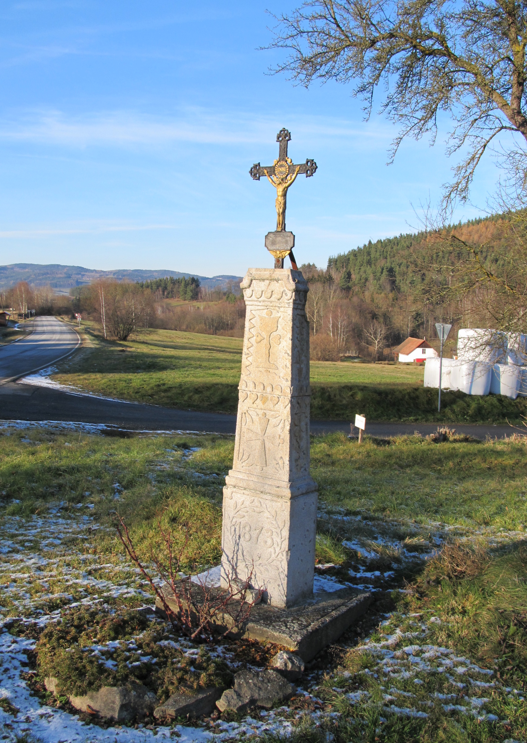 Budilov - křížek na rozcestí